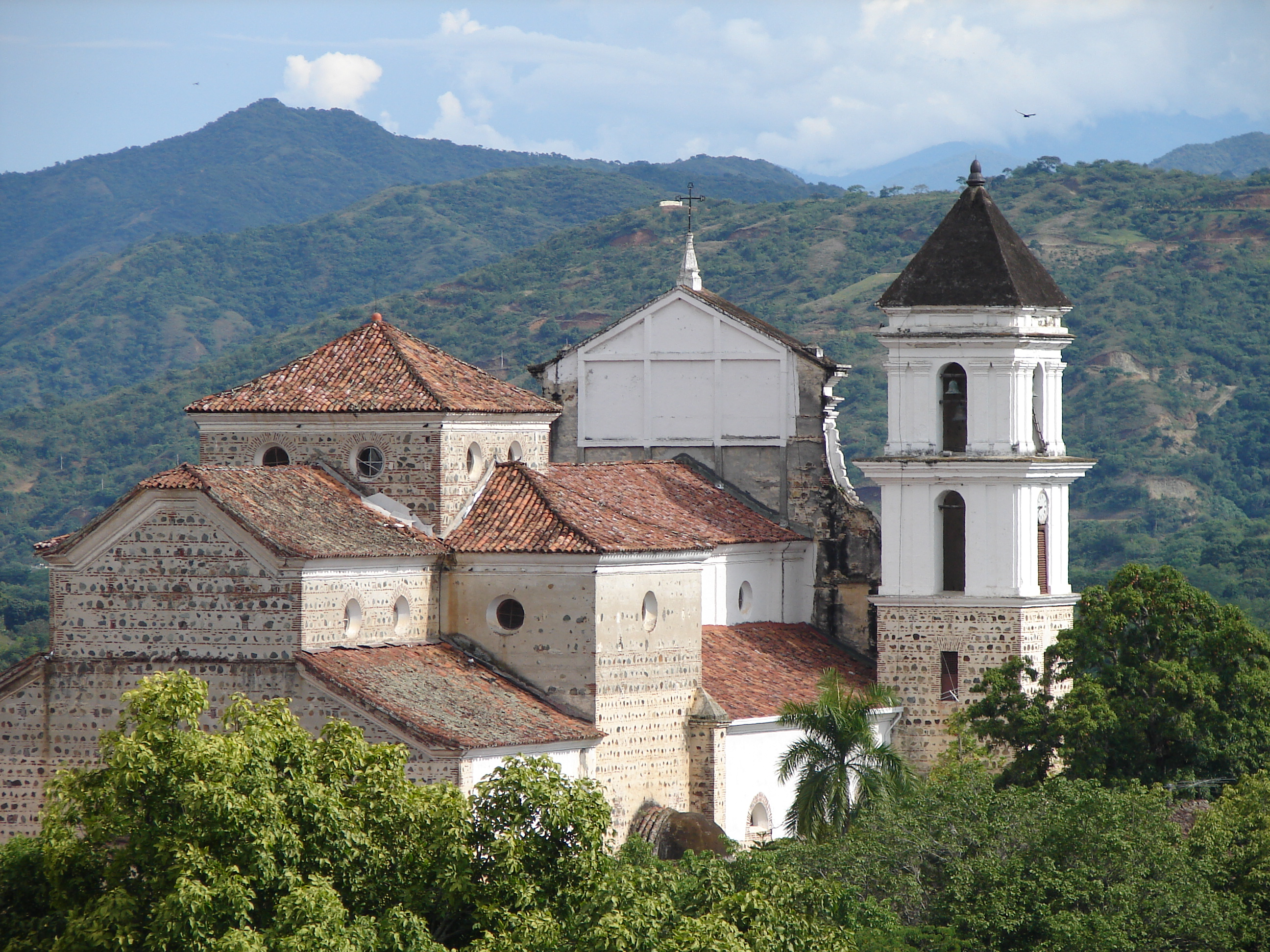 Sector Antiguo de la ciudad de Santa Fe de Antioquia: vista posterior